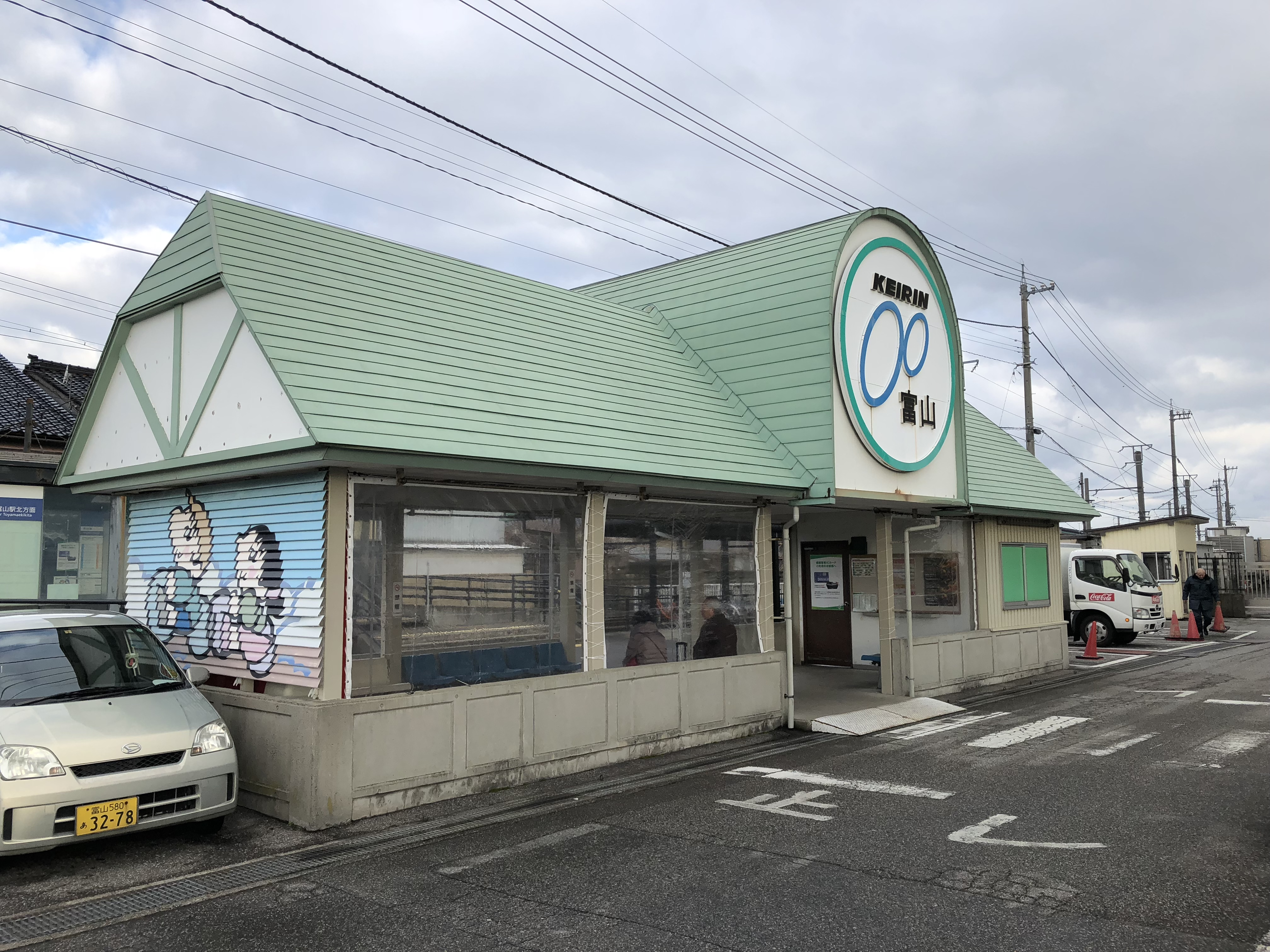 競輪場前駅